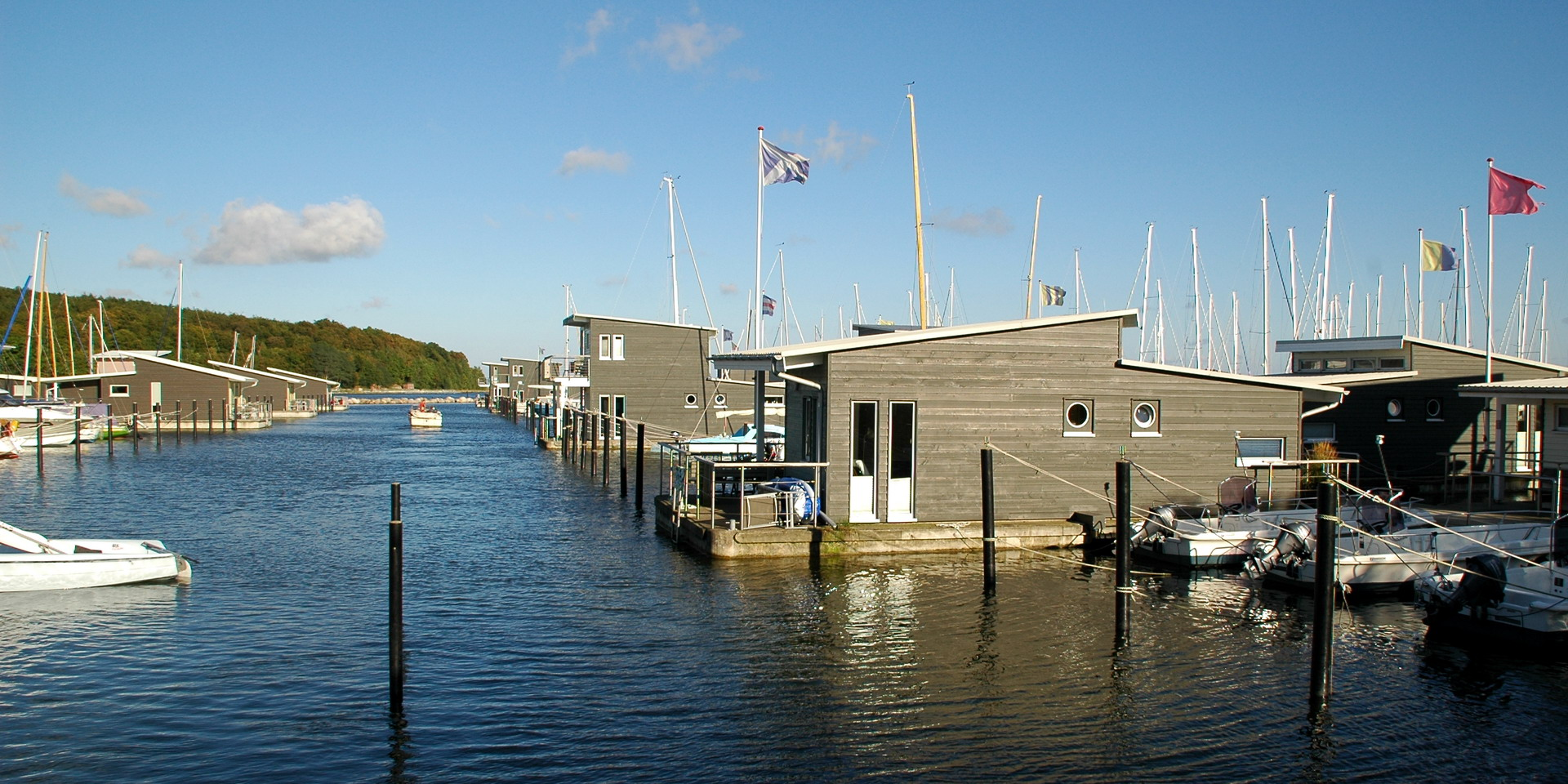 Schwimmhäuser auf Rügen